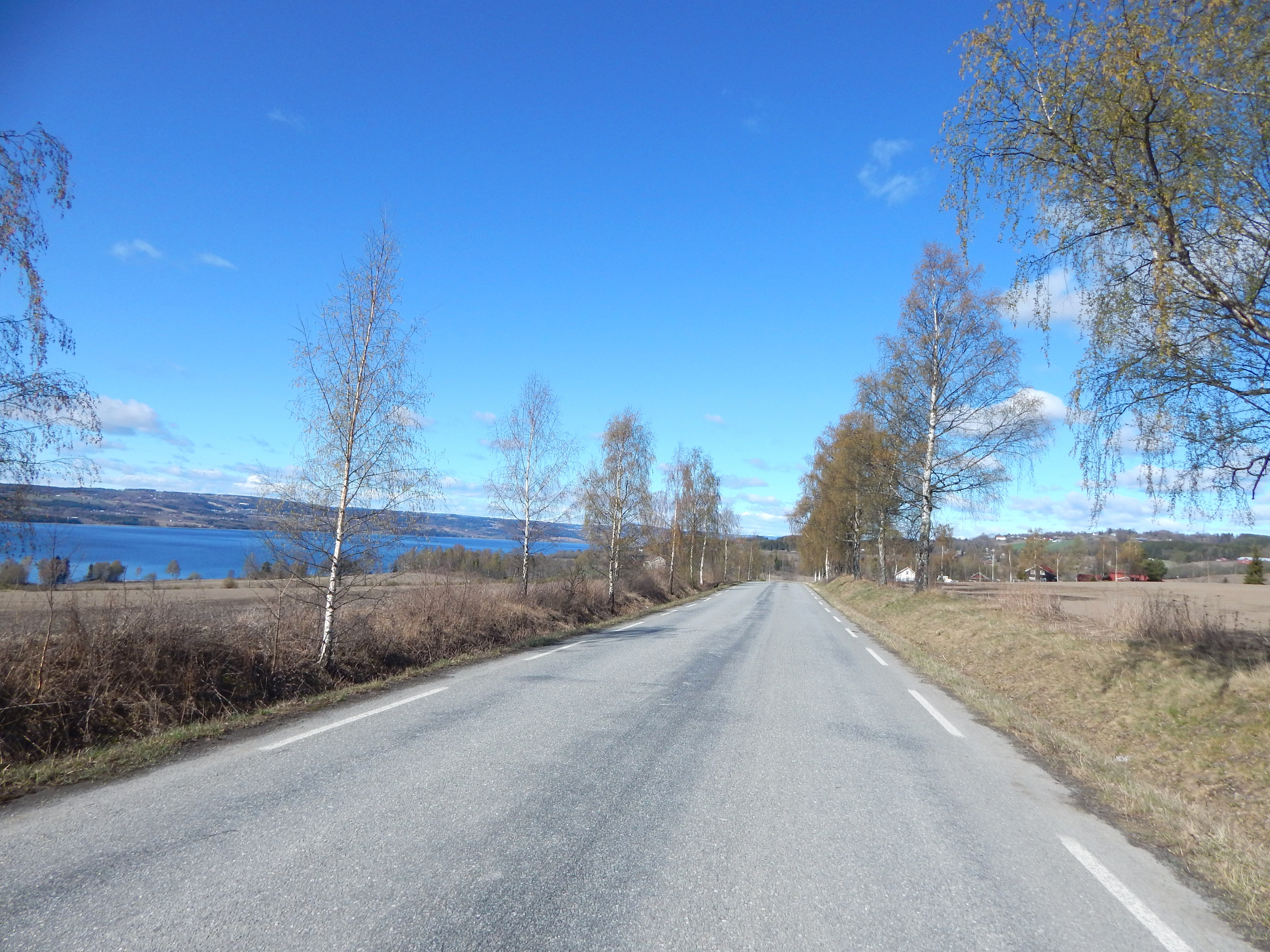 Kisevegen (fylkesvei 1700) ved for Tingnesvegen (primær fylkesvei 213)